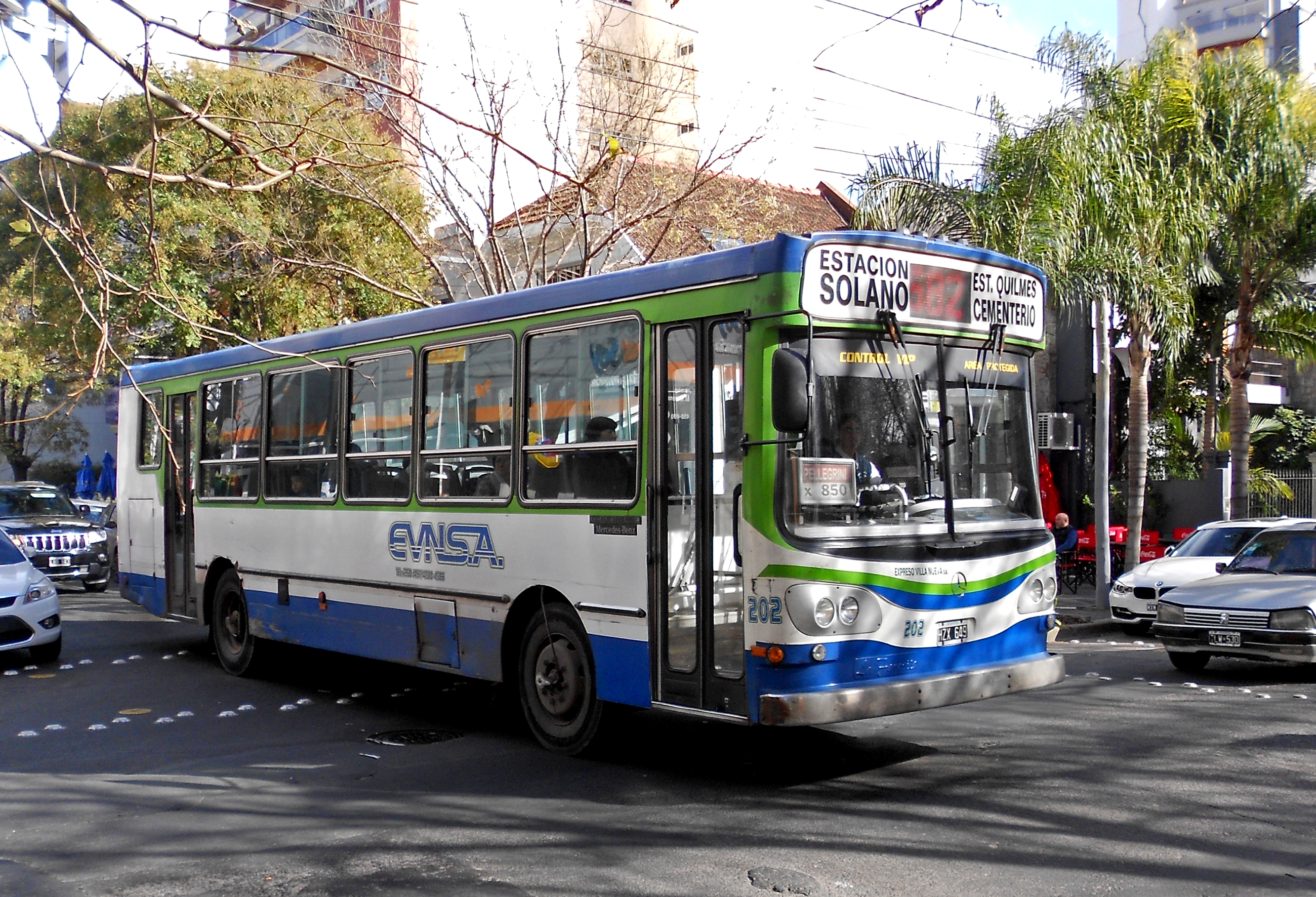 Interno de la línea 582 ramal Pellegrini x 850, circulando por Quilmes Norte.